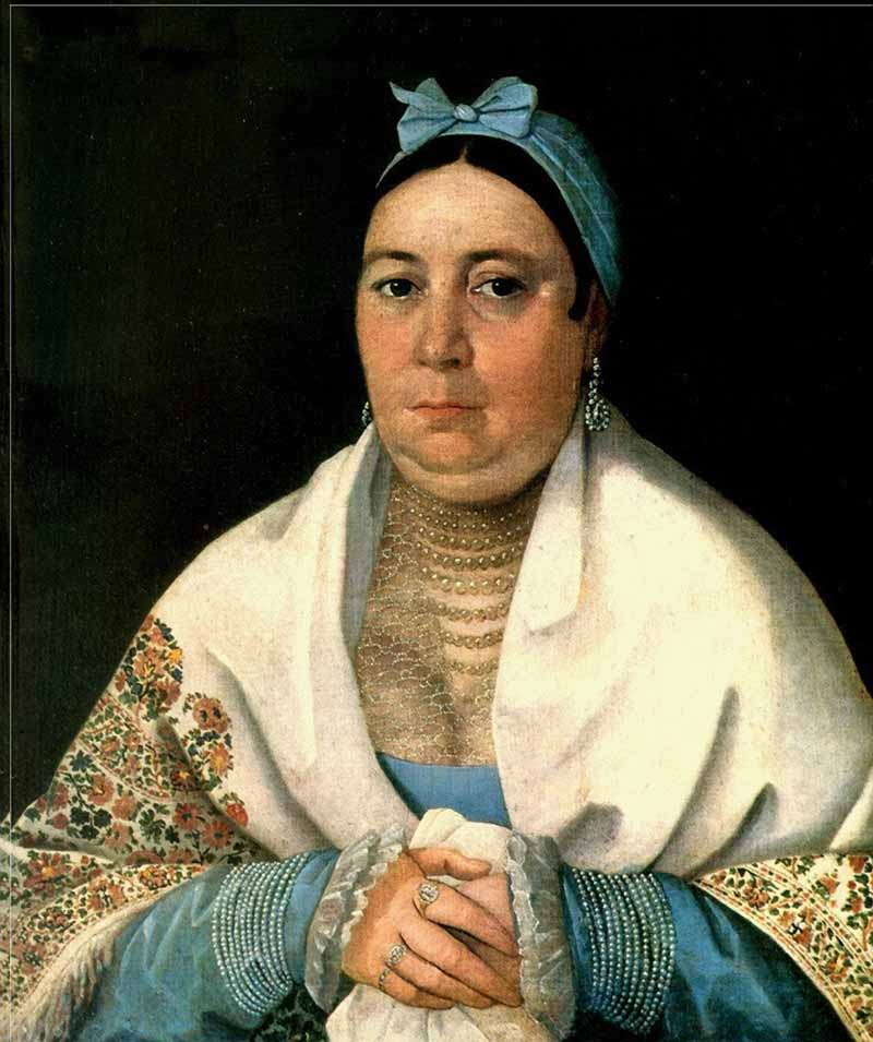 Мыльников Николай Дмитриевич «Портрет Астаповой П.И.» (1827) холст, масло. 65*56,5 Ярославский художественный музей